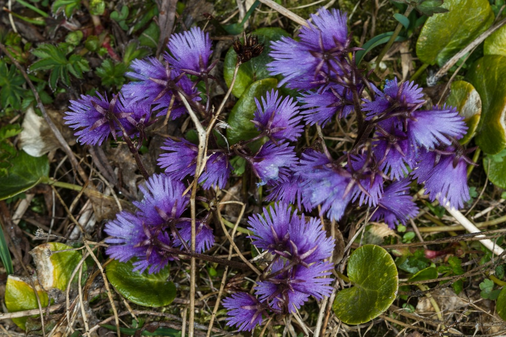 Alpen-Soldanelle am_Gamsgrubenweg (ca. 2400 m ü.M.)